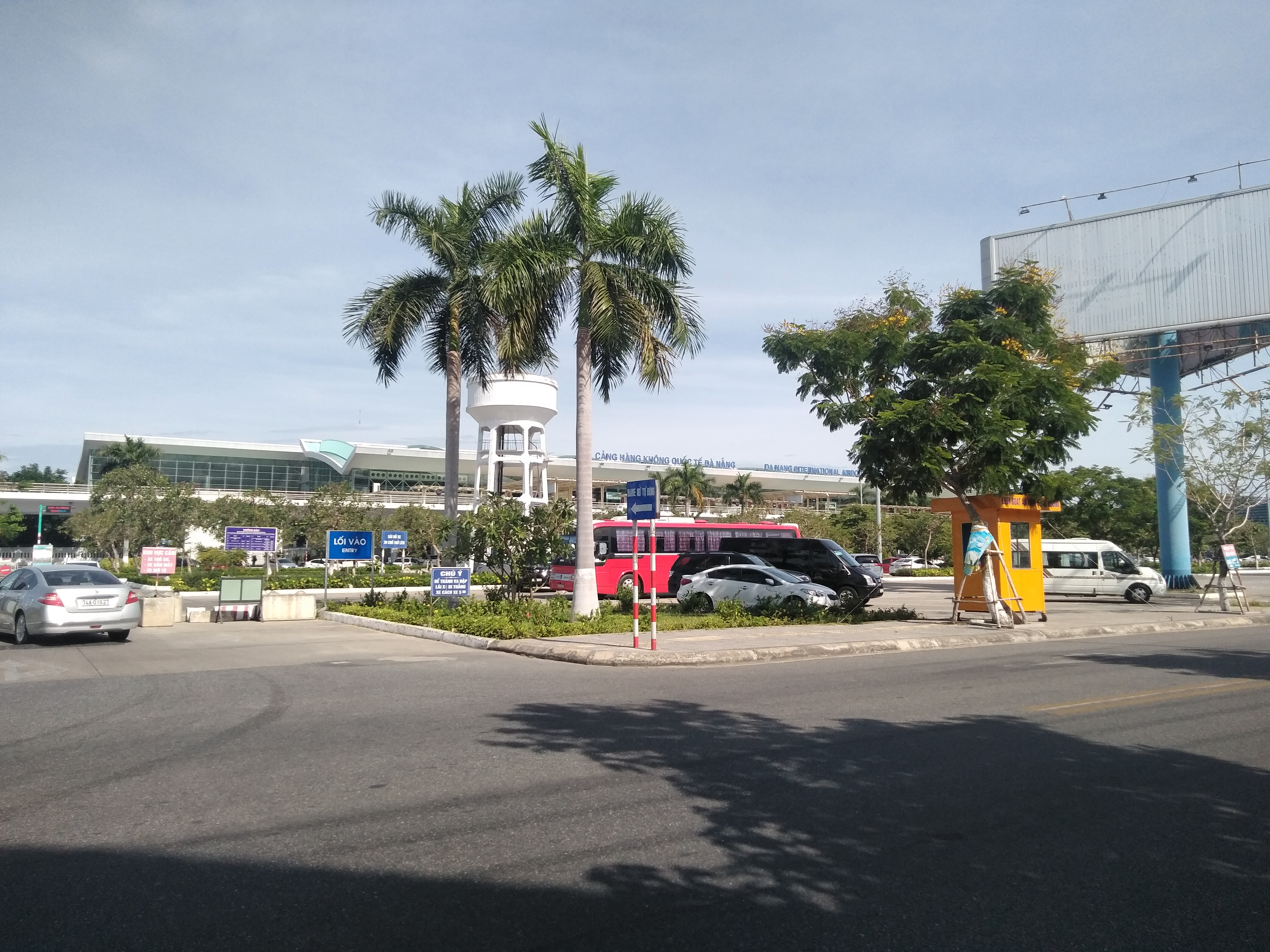 Sân bay Quốc tế Đà Nẵng